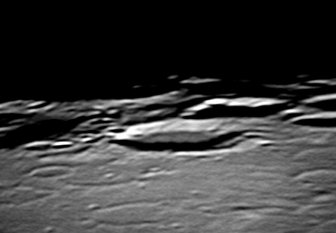 Cráter Cleostratus. Captura realizada utilizando un telescopio.